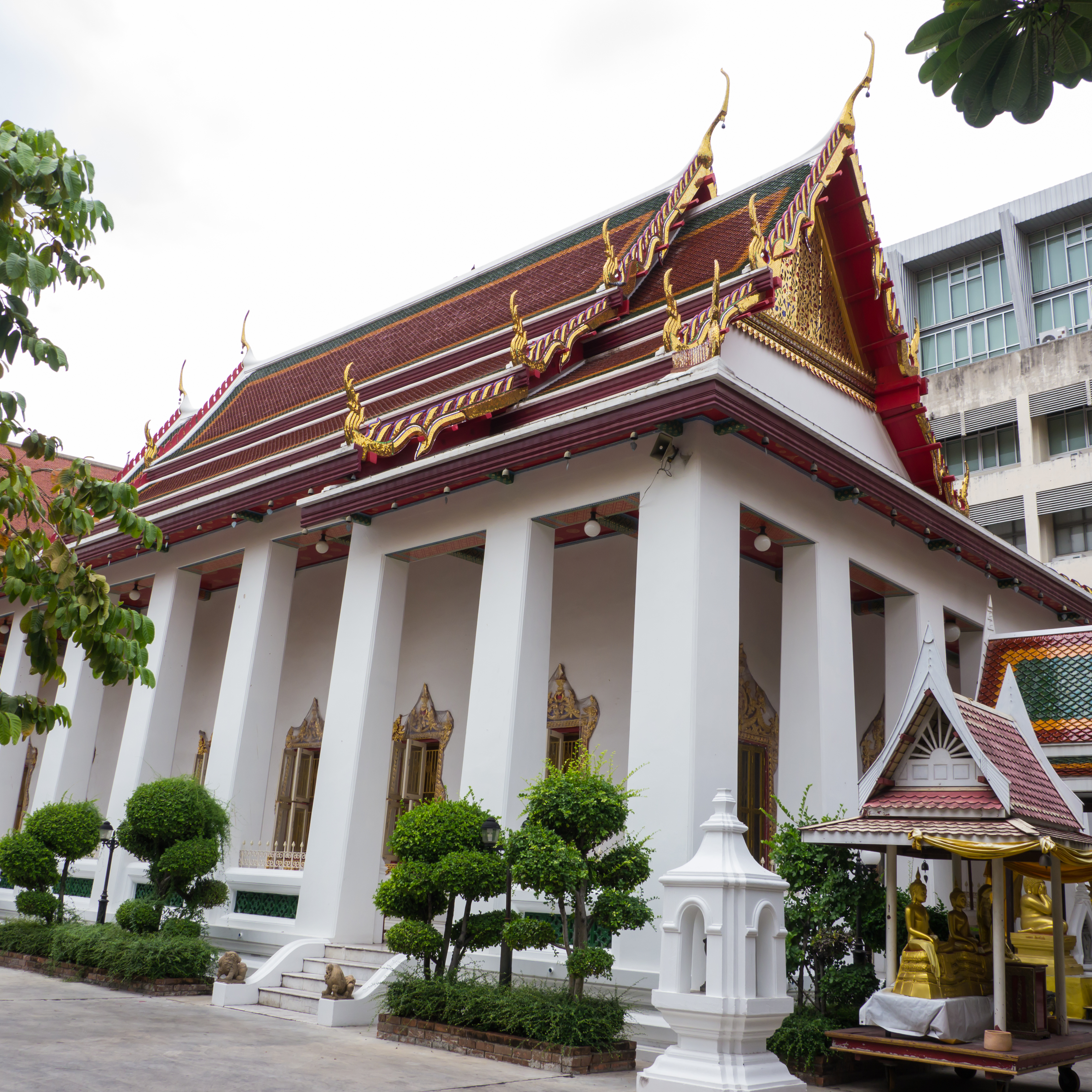 วัดบพิตรพิมุข